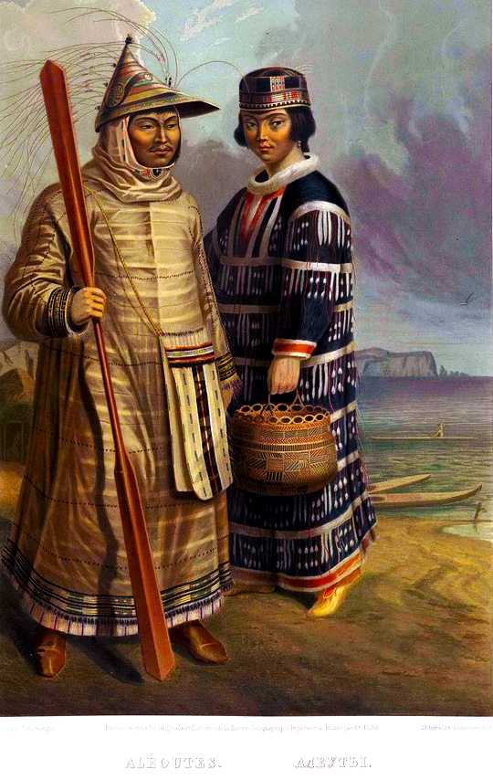 Алеуты. Этнографическое описание народов России Густава-Федора Христиановича Паули